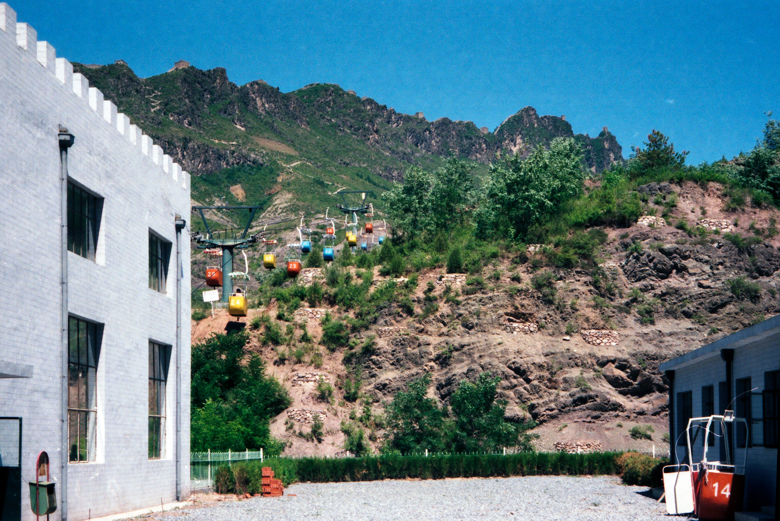 VR China, östliches Simatai, Gondelbahn